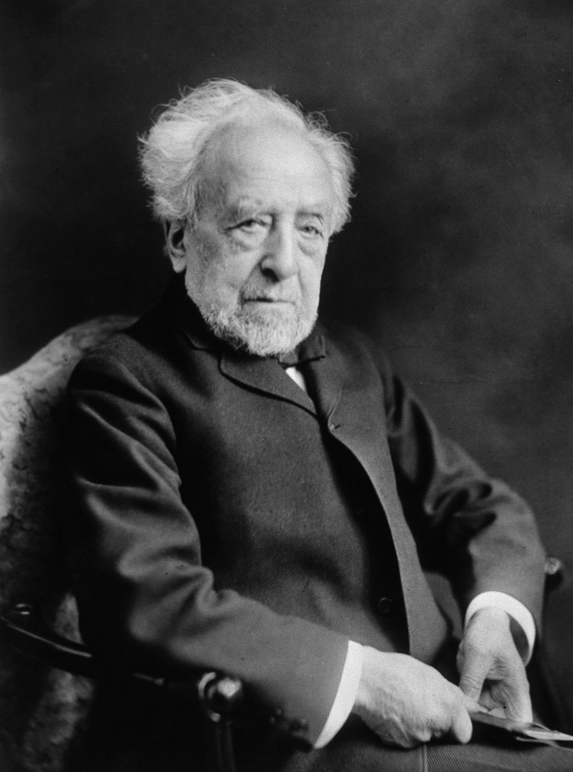 Abraham Jacobi, père de la pédiatrie US